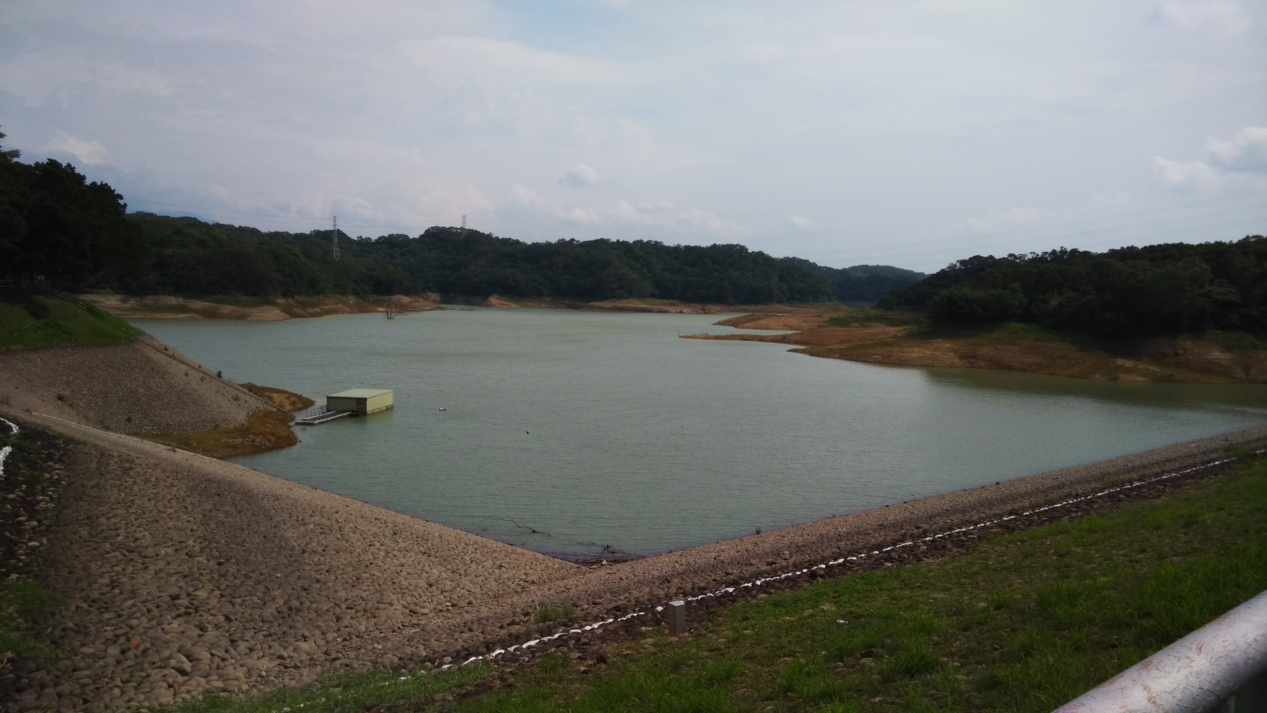 中文（台灣）: 永和山水庫一景